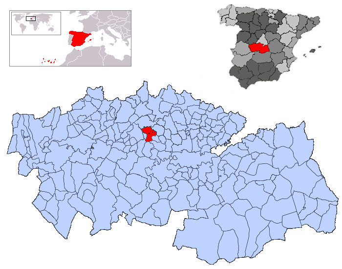 Santo Domingo-Caudilla en la provincia de Toledo